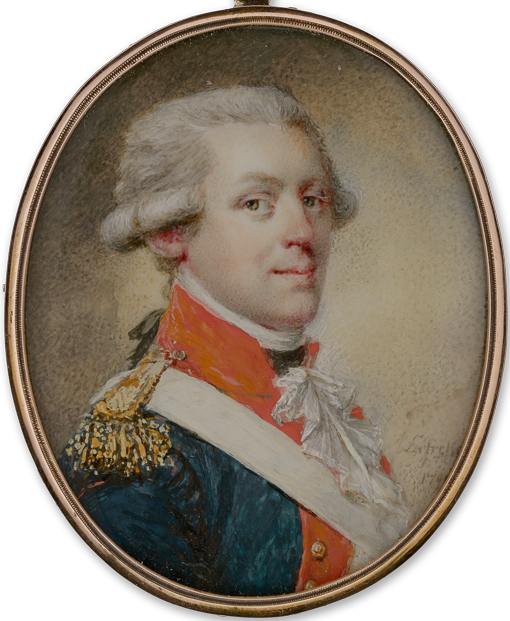 Lennart Reuterskiöld (1767-1832) iklädd uniform m/1792 för en kapten vid Änkedrottningens livregemente (som sedan blev Göta Livgarde).